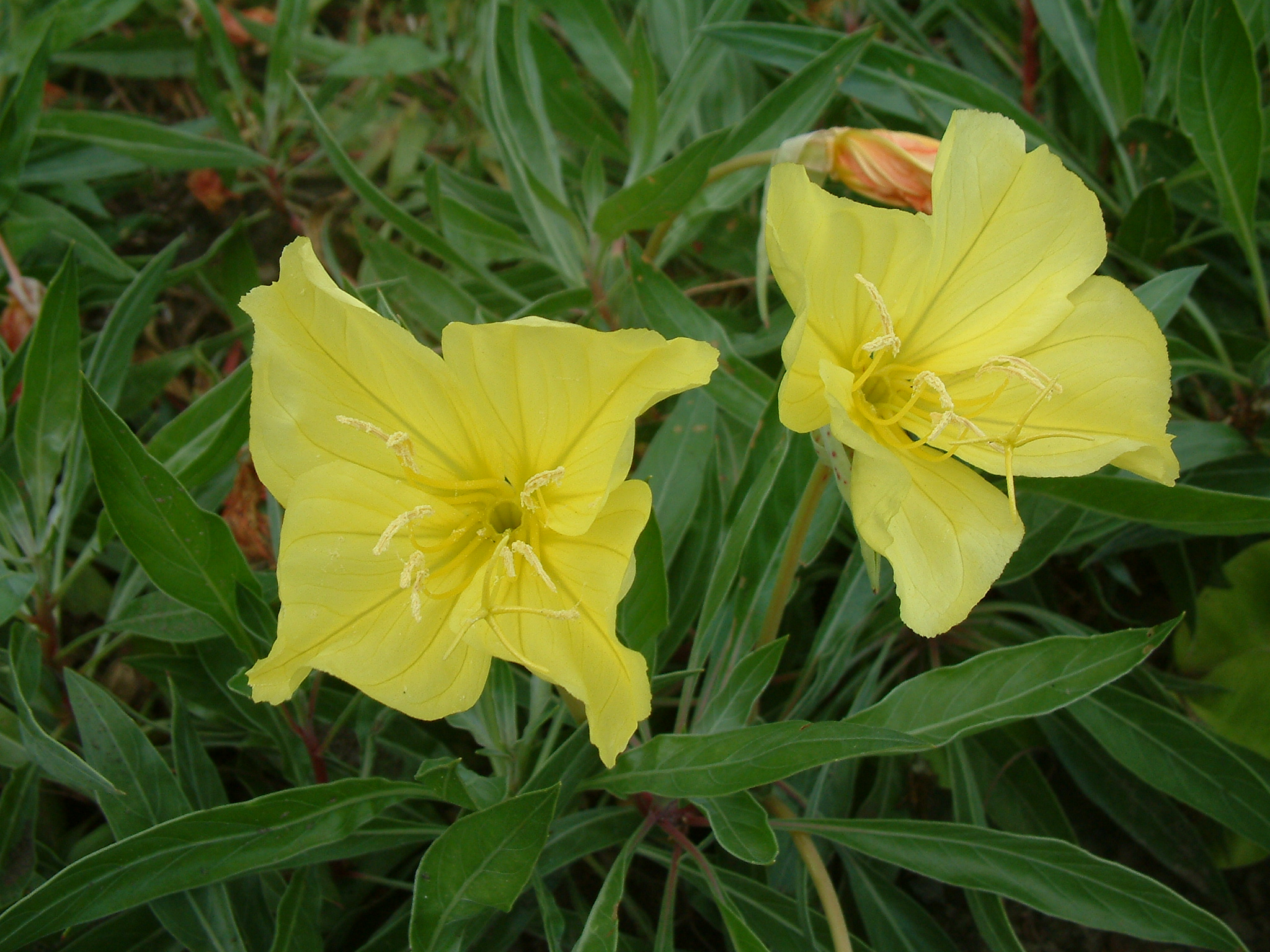 Oenothera macrocarpa, Botanical Garden in Poznań